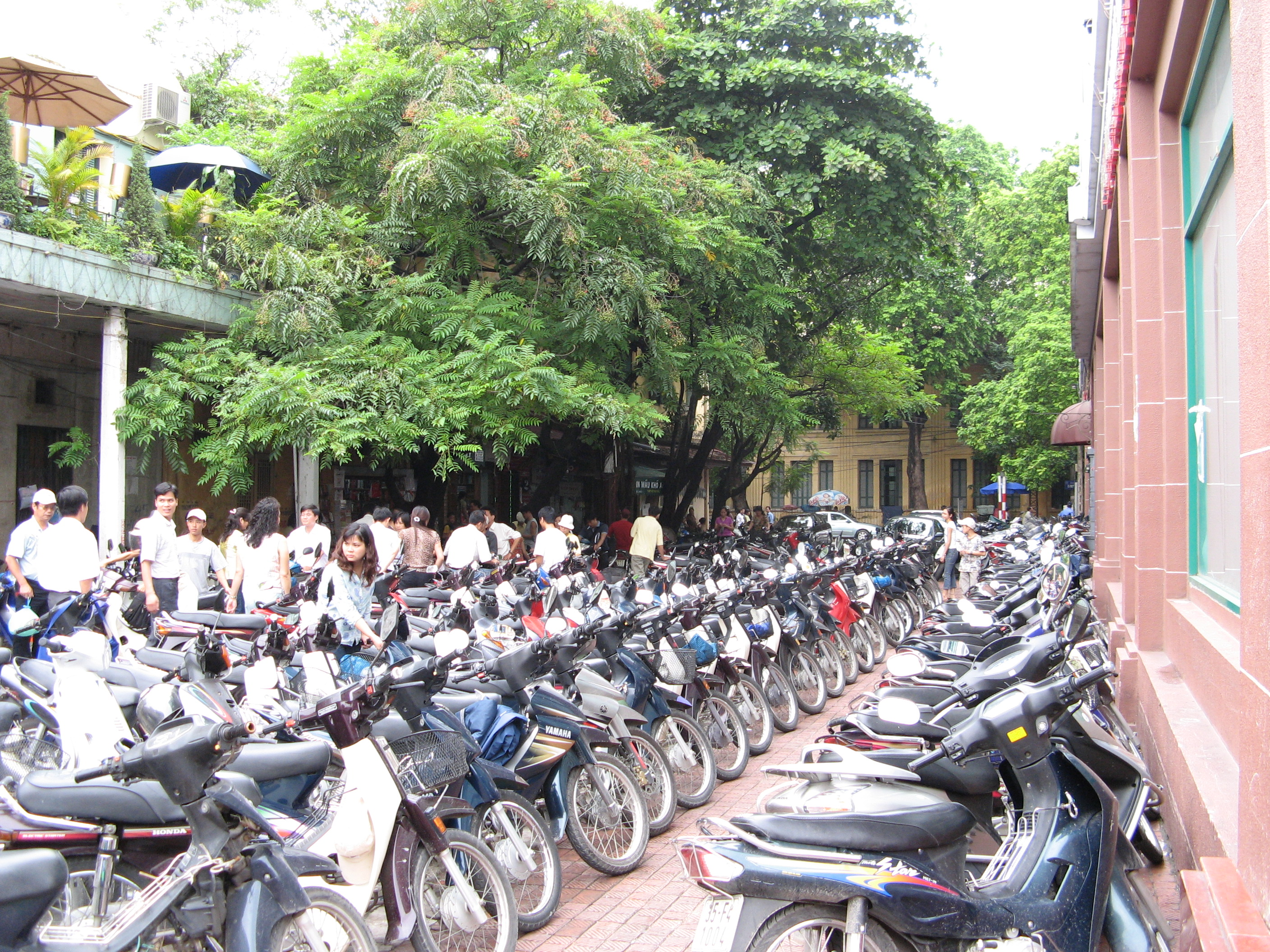 hanoi vietnam